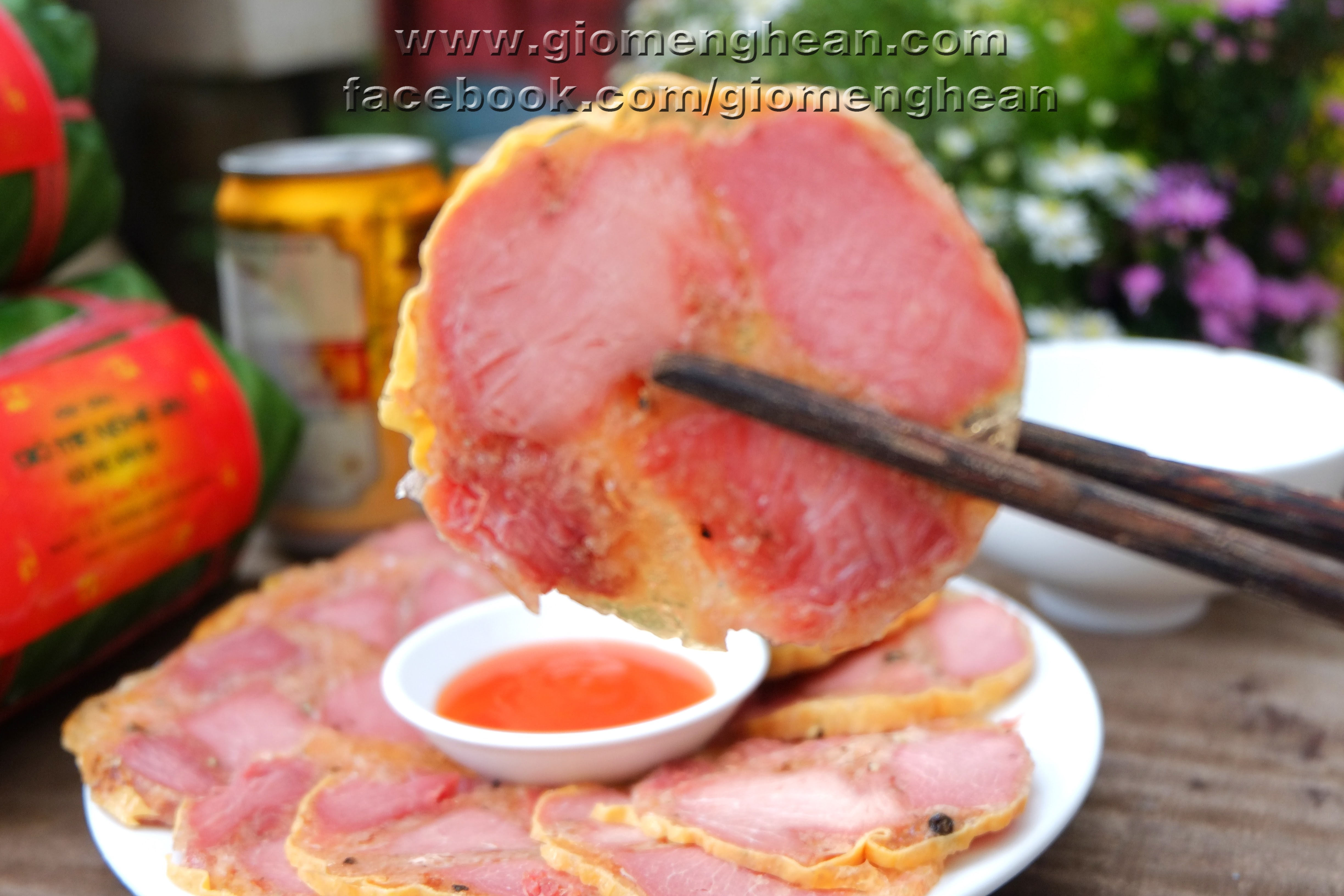 Giò me Nghệ An - đặc sản Nghệ An